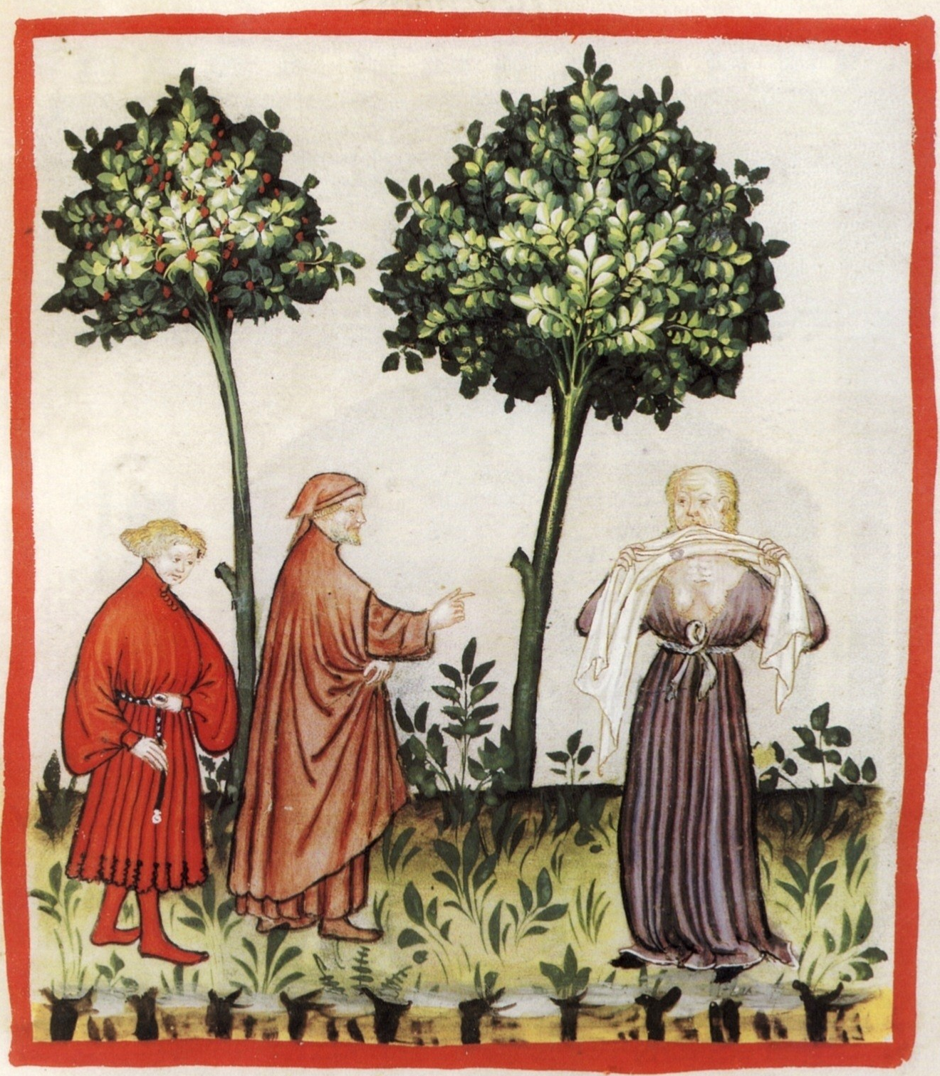 Miniatur aus dem Kodex Tacuinum Sanitatis (Vindob. Ser. n. 2644). Eine Illustration zu einem Text über „Zorn“ des orientalischen Arztes Ibn Botlan.